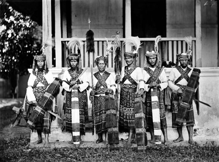 Negatief. Erewacht te Minahasa